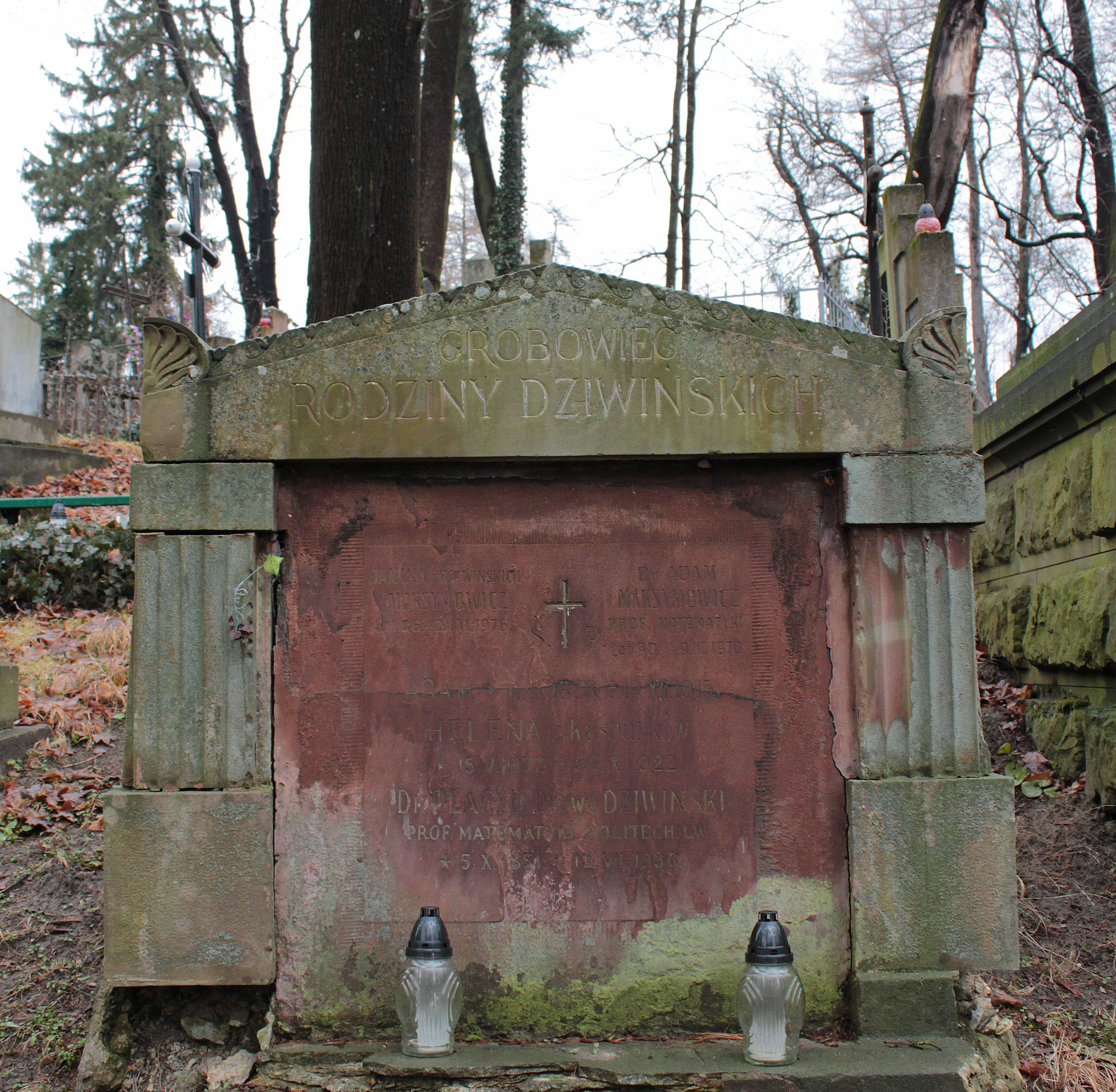 Гробівець родини Дзівінських. Личаківський цвинтар , поле № 15.